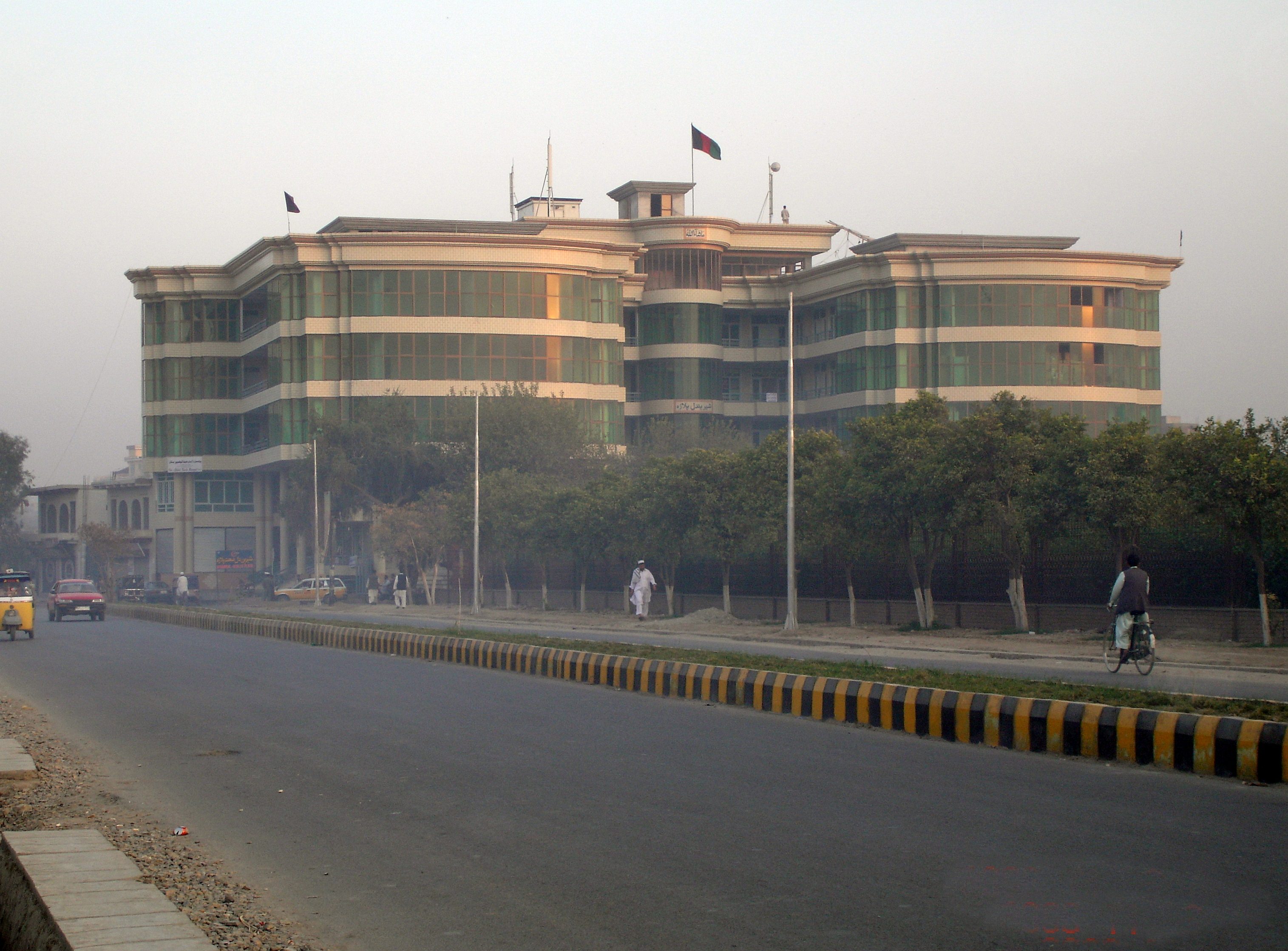 Jalalabad